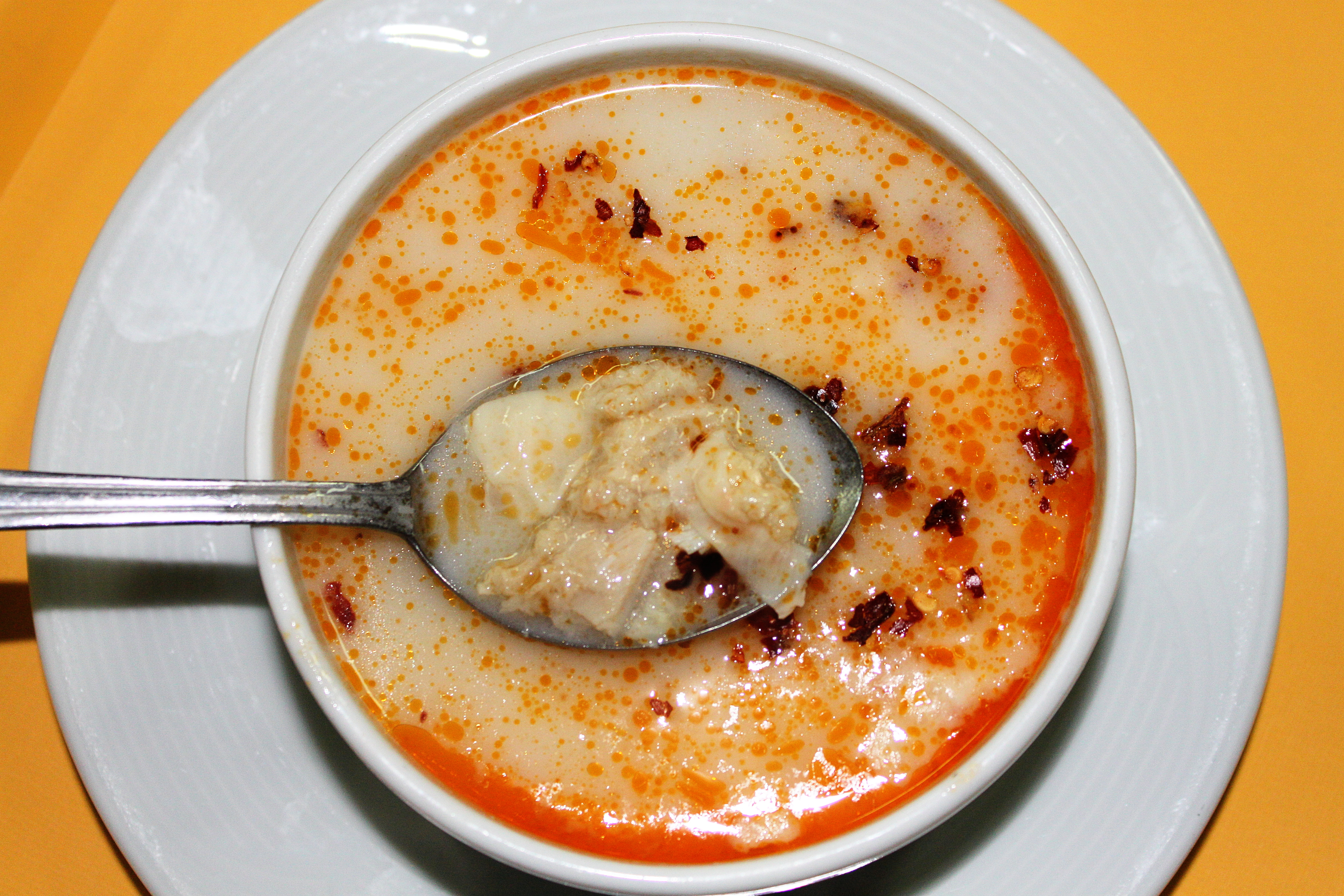 Schkembe Tschorba = Kuddelsuppe oder Fleckensuppe, eine typische bulgarische Suppe mit Kutteln - der in Streifen geschnittenen Vormagen (Pansen) von Wiederkäuern; türkischen Ursprungs: İşkembe çorbası